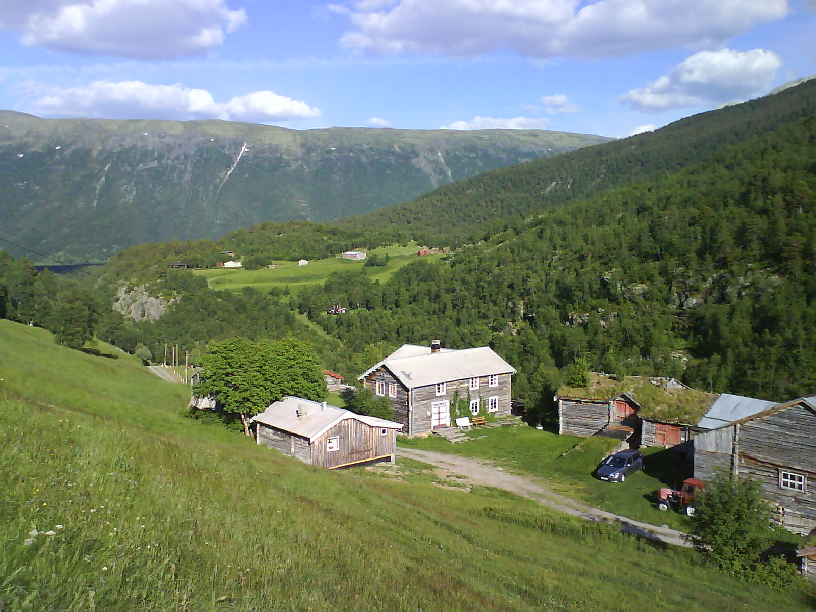 Åmotsdalen gård fra slutten av 1600-tallet var i drift fram til 1990-tallet